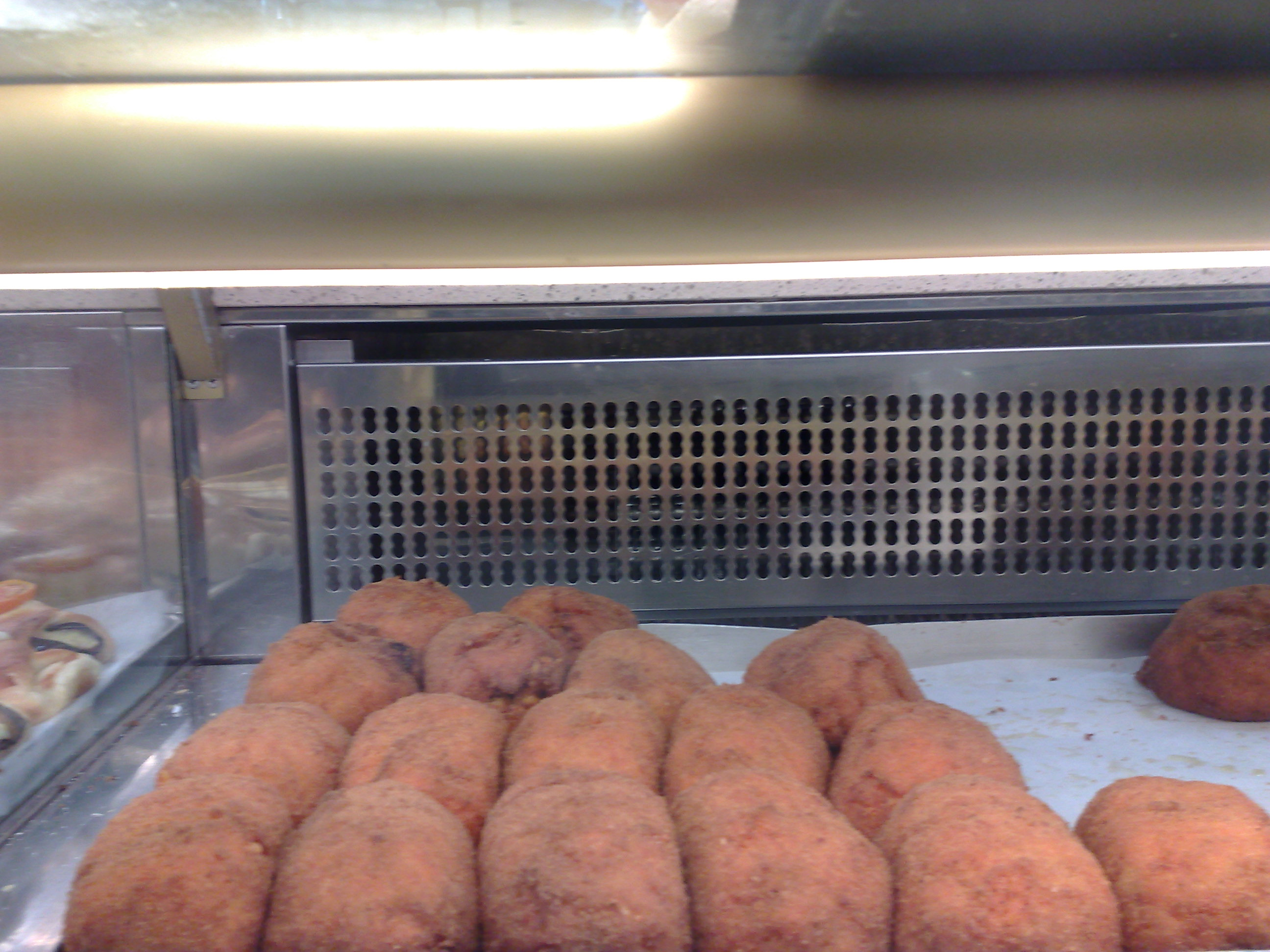 "Arancine bomba"